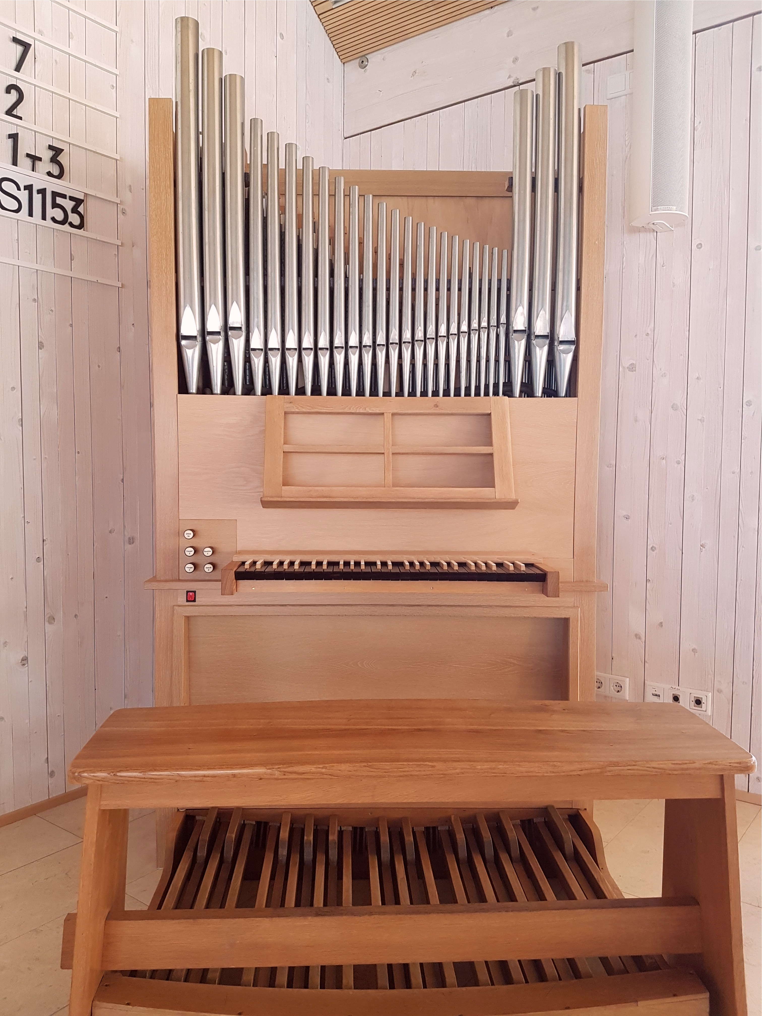 Orgel der Dietrich-Bonhoeffer-Kirche in Wenzenbach